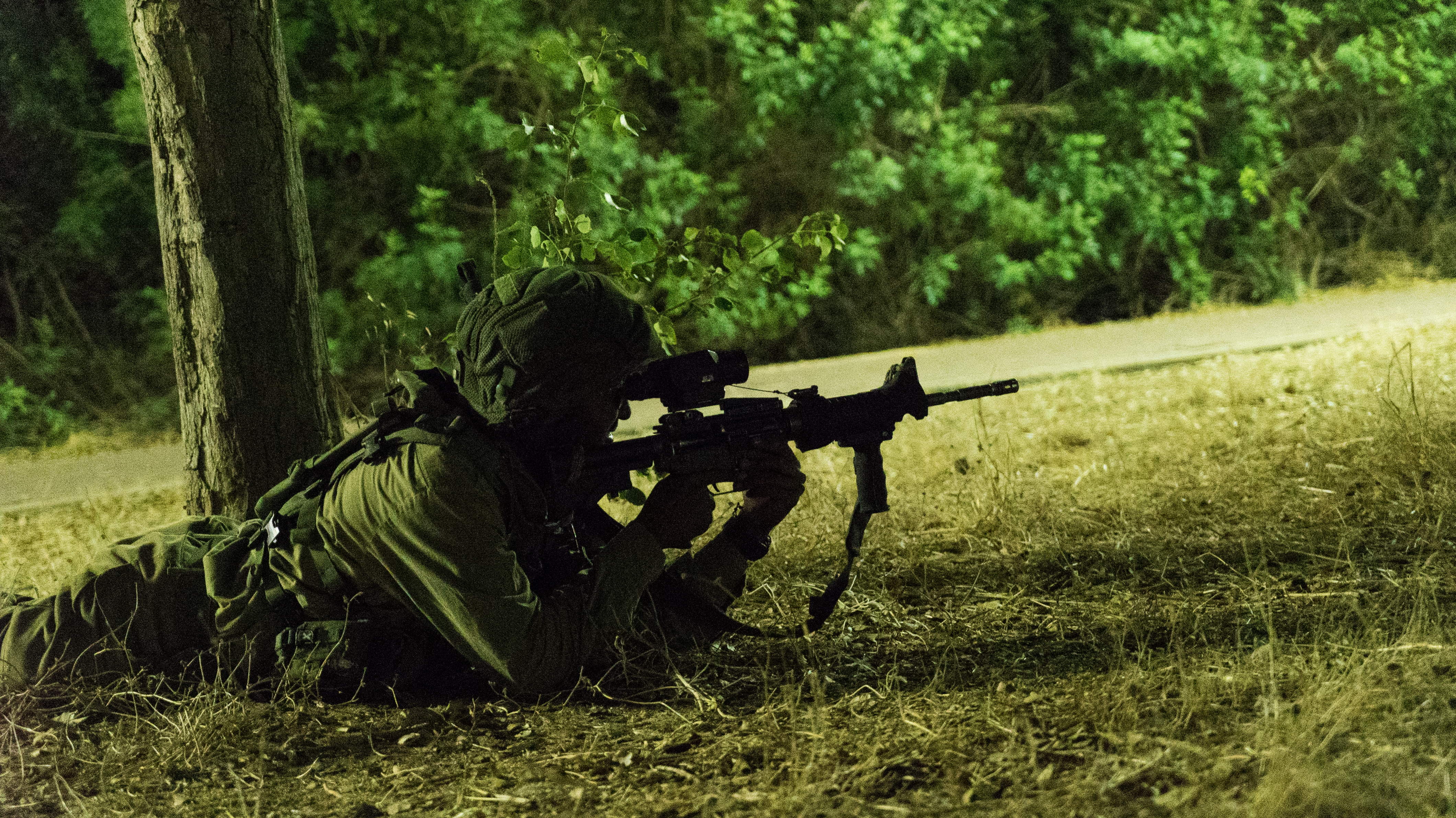 המיונים ליחידת מגלן.